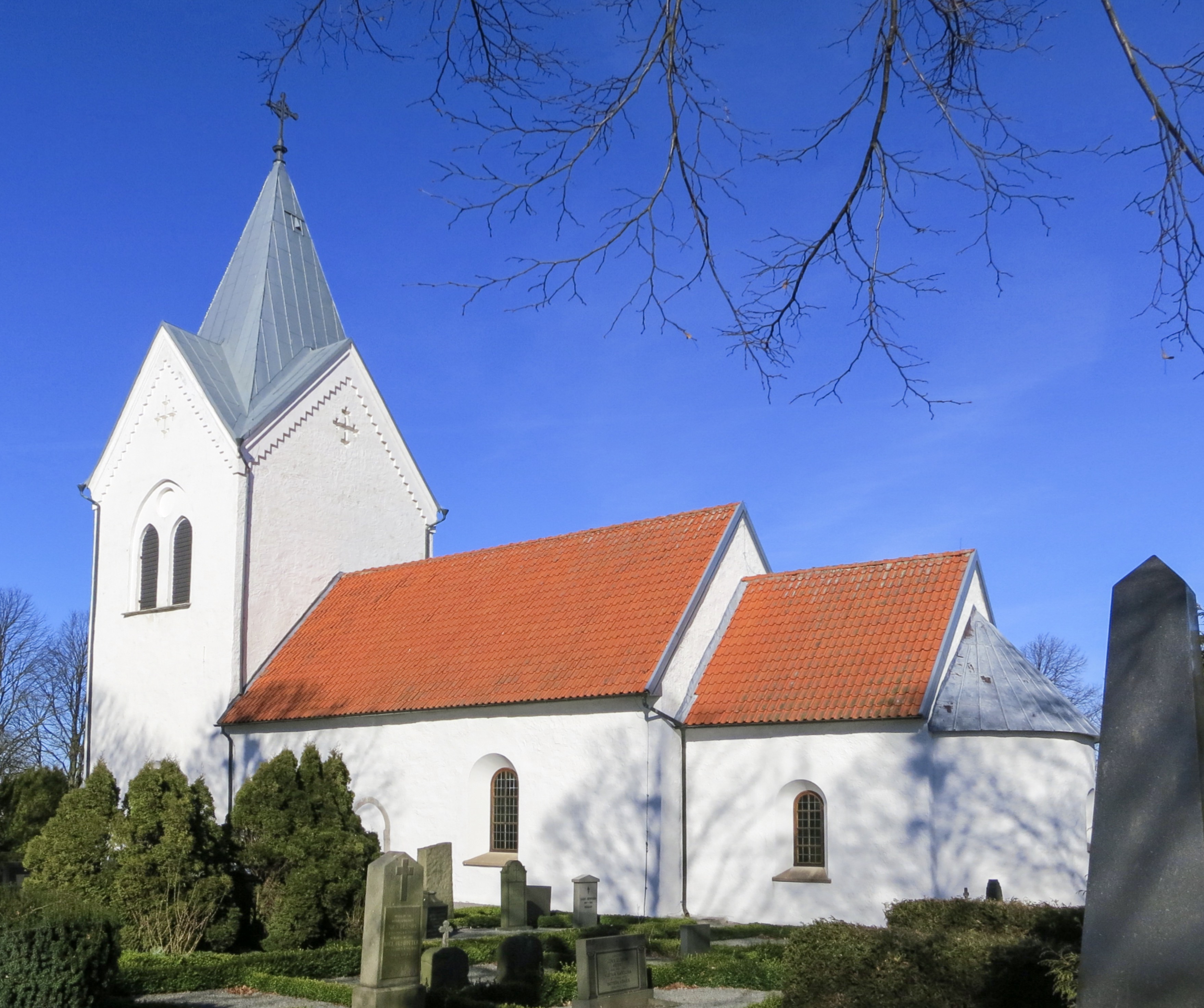 Västra Nöbbelövs kyrka i Skurups kommun